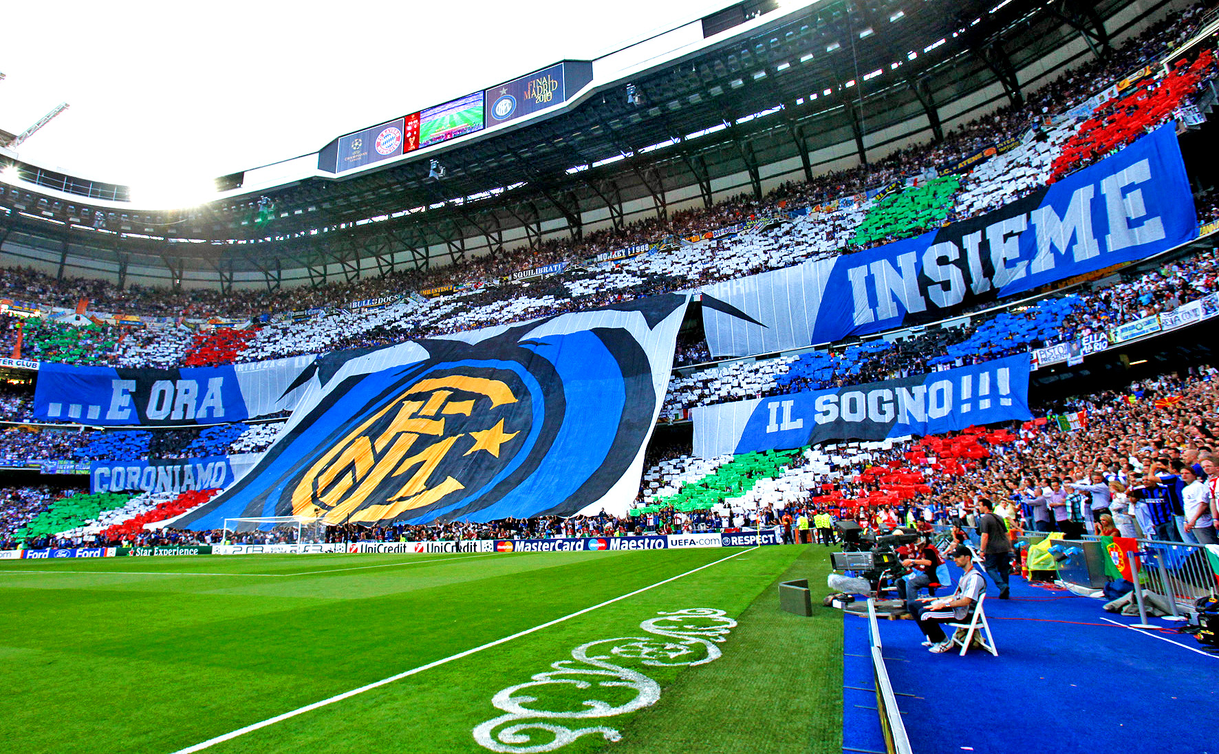 La coreo della nord nella notte del triplete, al Santiago Bernabeu